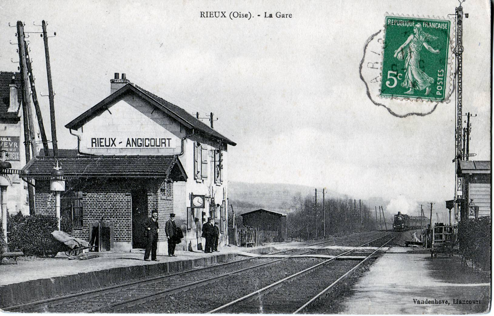 Carte postale ancienne éditée par VandenhoveRieux (Oise) : La Gare de Rieux-Angicourt